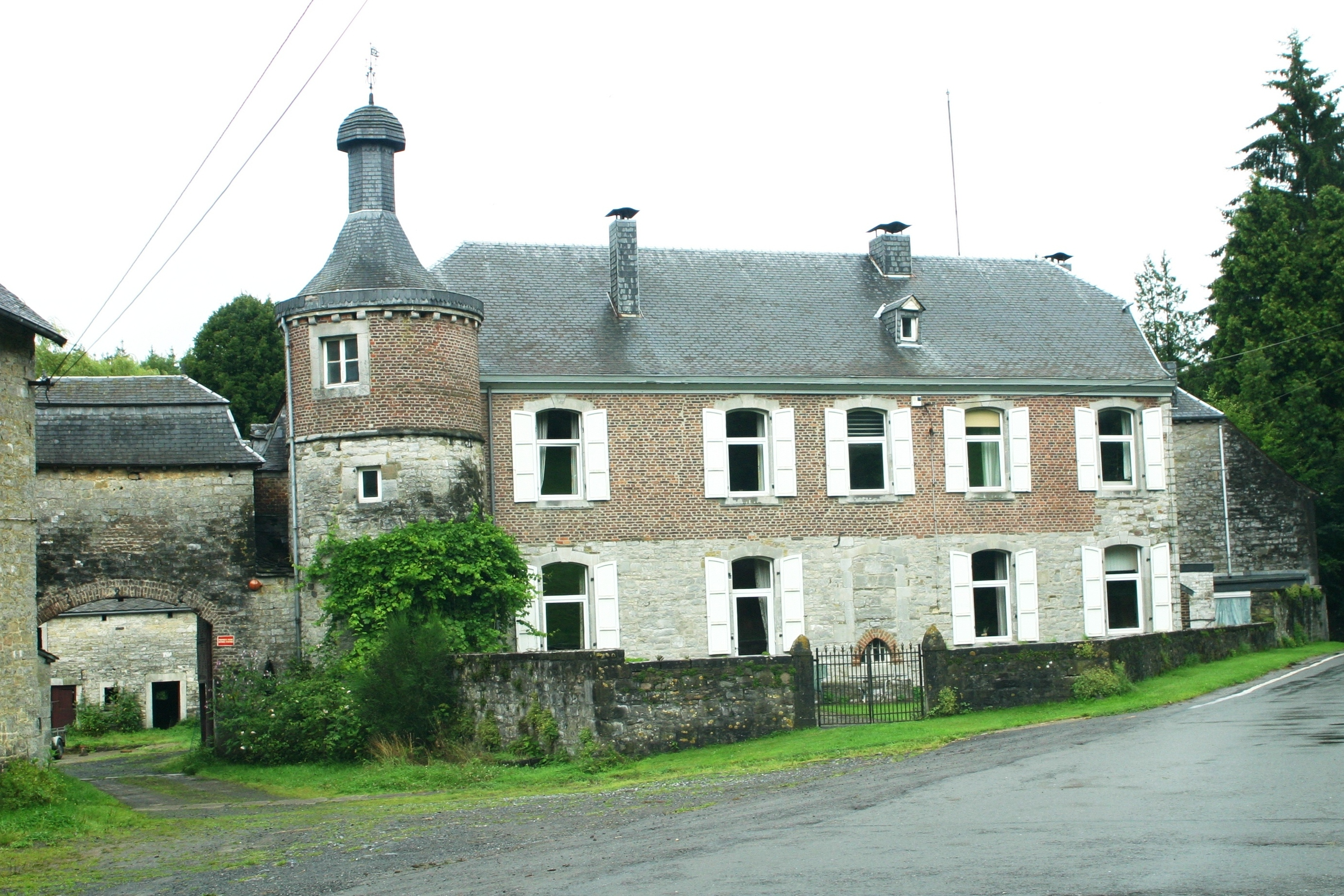 D'Ferme Ferot an der Gemeng Ferrières op där en Deel vum Film Folle Embellie gedréint gouf.